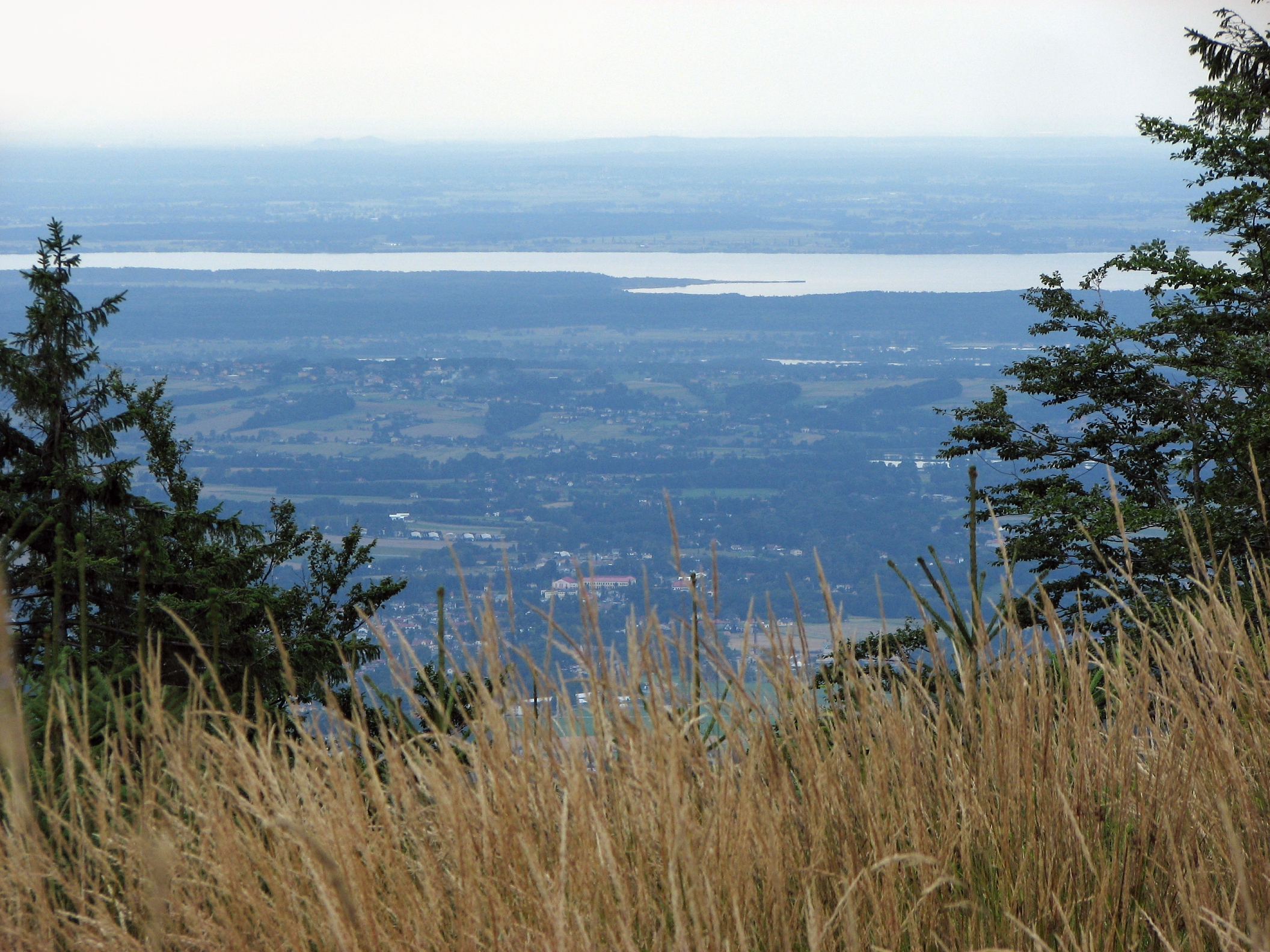 Widok na Jezioro Goczałkowickie ze szlaku Trzy Kopce - Błatnia.